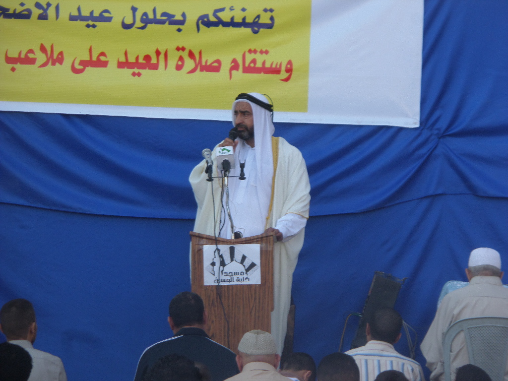 خطبة صلاة العيد في الساحة المجاورة للمسجد